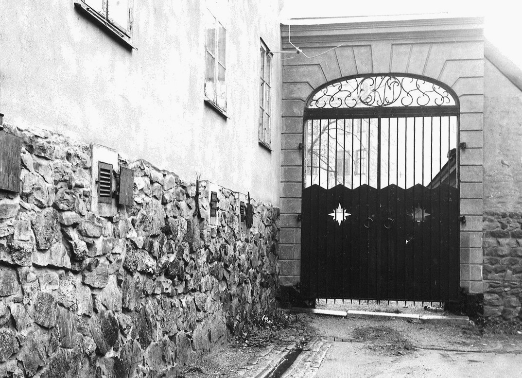 Fastigheten Drottningen 5, Katarina kyrkobacke 7 / Högbergsgatan 16, grind med initialer EKM (Elias Kullman = byggherren)